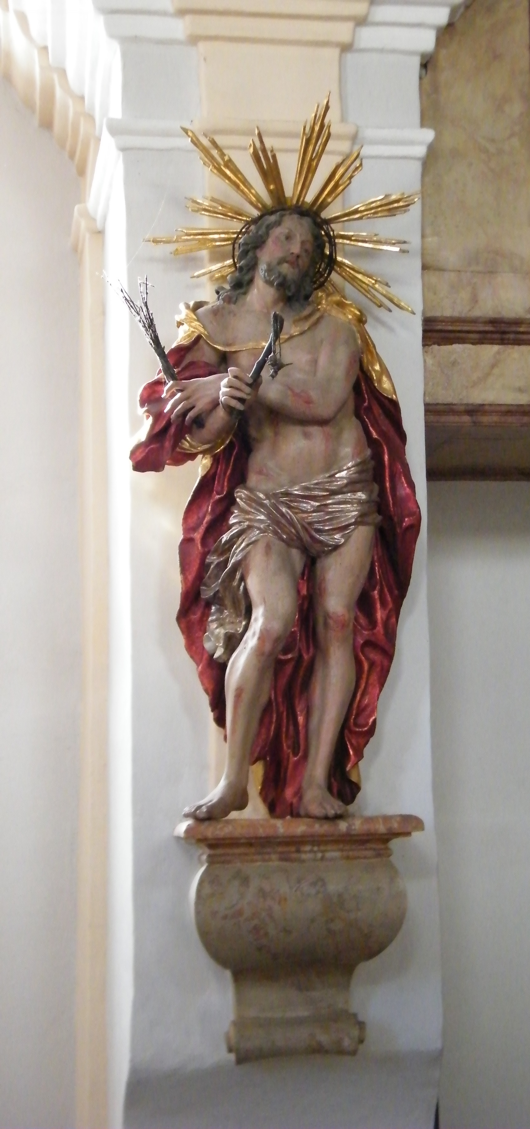 Ecce homo aus der Werkstatt Meinrad Guggenbichler 1702